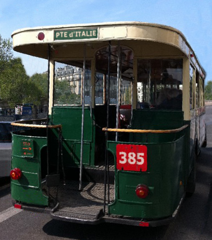 Bus parisien TN6 à galerie (vehicule du patrimoine roulant)